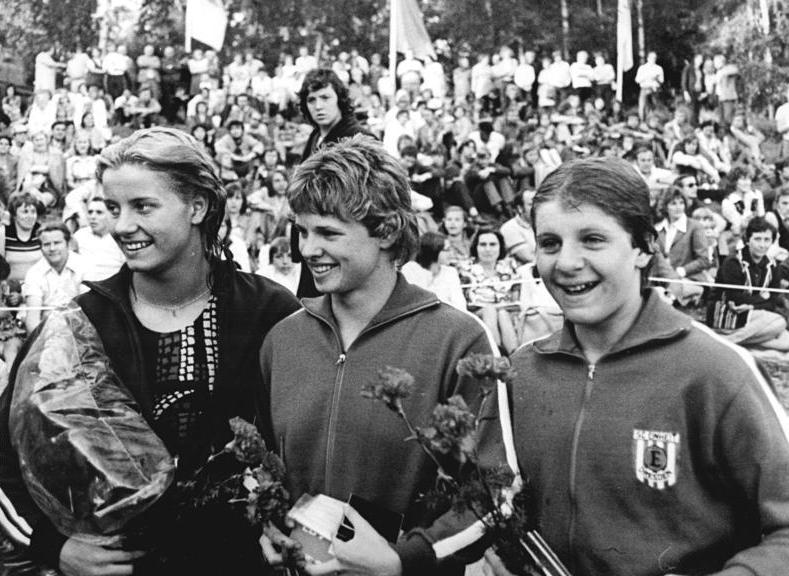 Ulrike Richter, Kornelia Ender, Birgit Treiber ADN-ZB Kluge str-9.6.75-Bez. Halle: DDR-Meisterschaften im Sportschwimmen-Drei Weltrekordlerinnen standen am 8.6. im Volksbad Wittenberg-Pietzeritz auf dem "Siegertreppchen" nach dem 100-m-Rücken-Finale. Ulricke Richter (M.), die Weltrekordlerin auf dieser Strecke, erreichte mit 1:03,52 min ihre bisher zweitschnellste Zeit. Die Freistilspezialistin Kornelia Ender (l.) schob sich mit 1:03,99 auf den zweiten Platz der Weltbestenliste in dieser Disziplin. Dritte wurde Birgit Treiber, die zwei Tage zuvor auf der 200-m-Distanz eine neue Weltbestmarke gesetzt hatte.